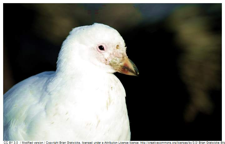 Skedenæb